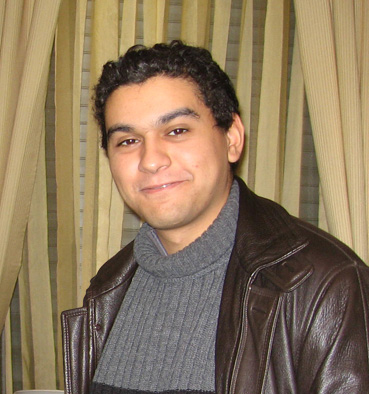 Talal SELHAMI, réalisateur maroco-francais